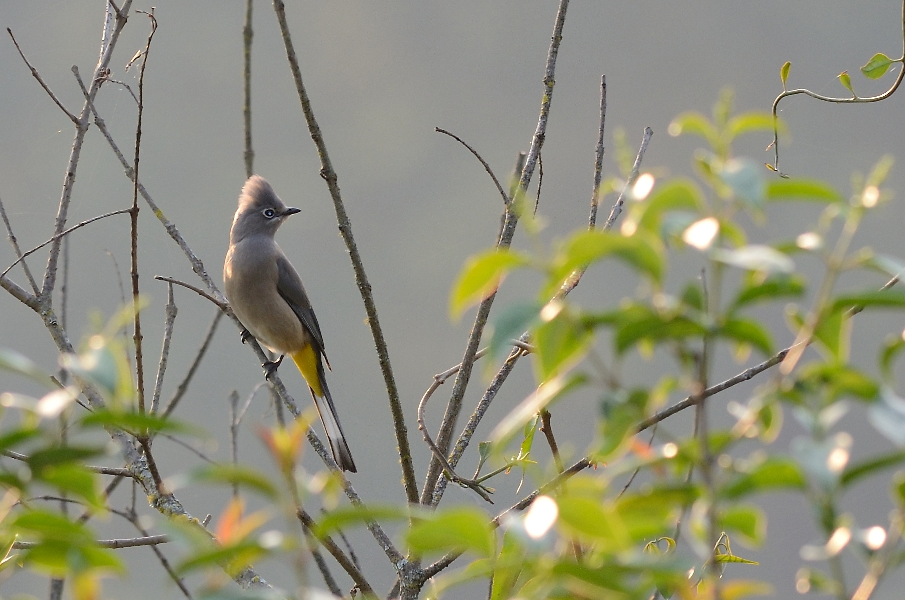 Ptilogonys cinereus